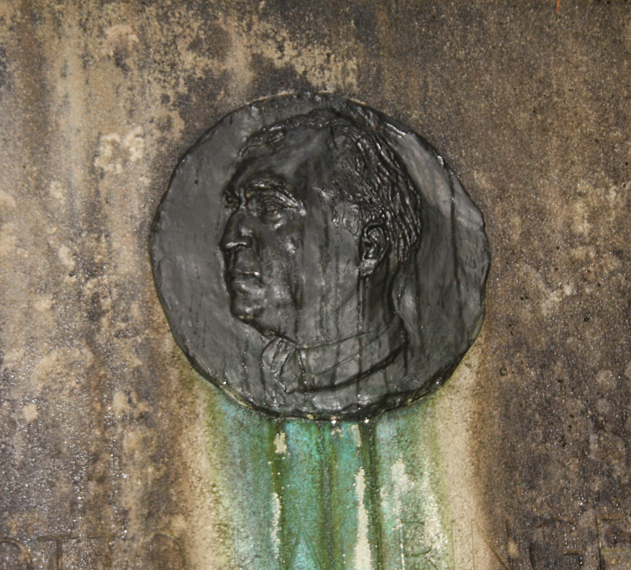 Porträtmedaillon auf dem Grabstein Otto Laubingers, Südwestkirchhof Stahnsdorf